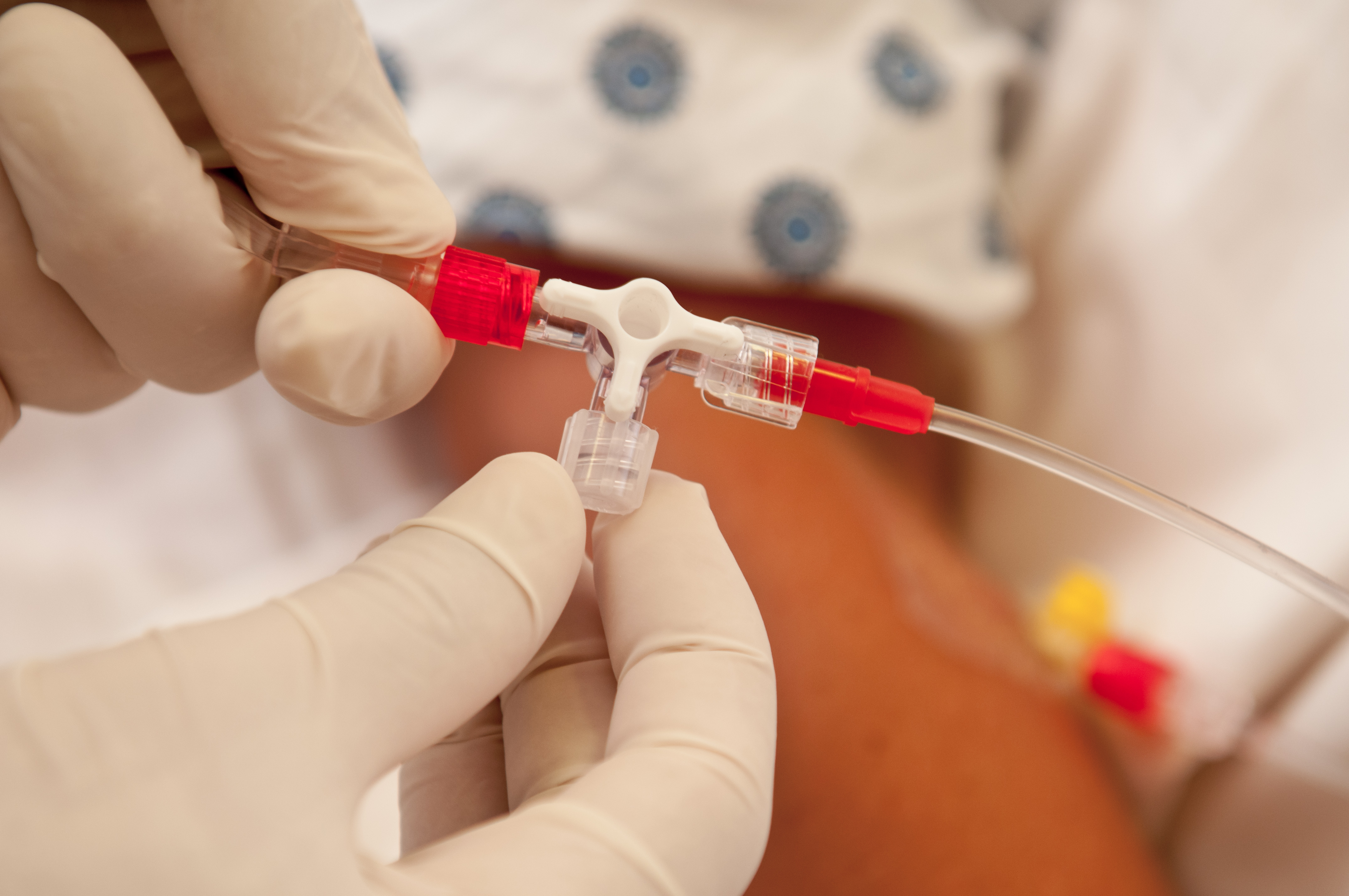 Elcam stopcock in use